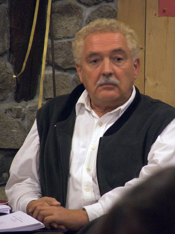 Profesor Adam Jezierski podczas wykładu w Bielicach